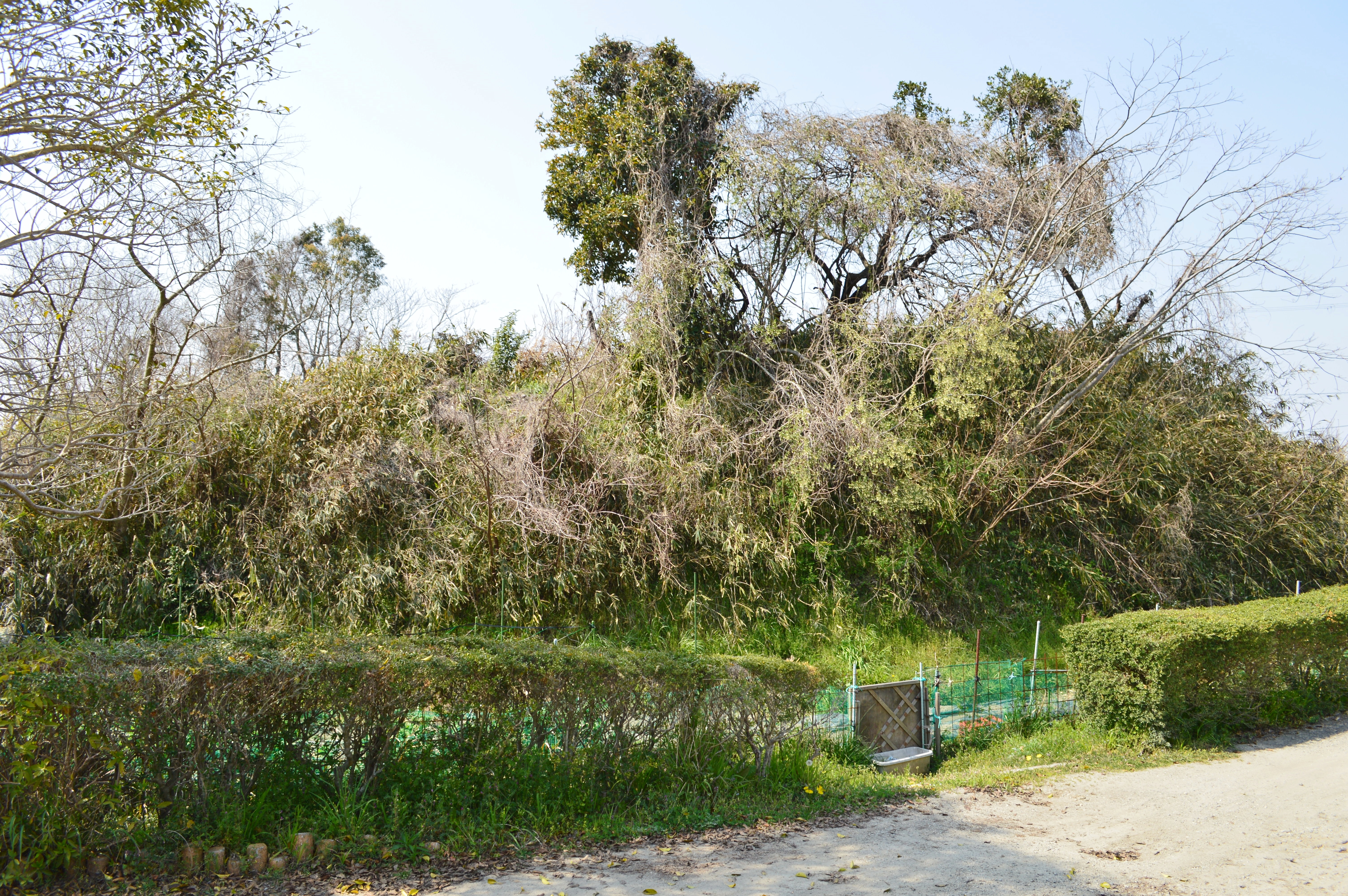 釜戸塚古墳 墳丘全景 Nikon D3200